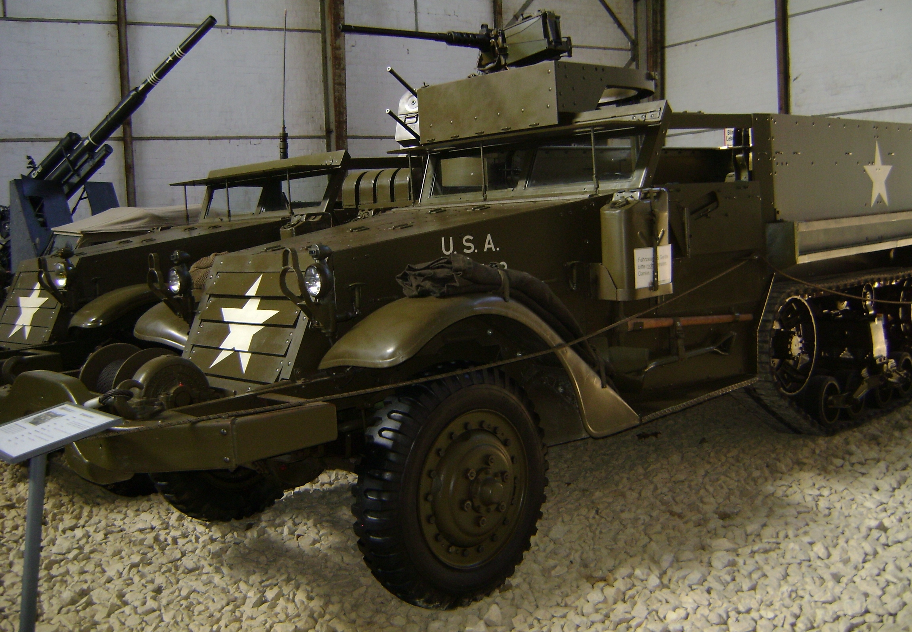 US Army Maultier